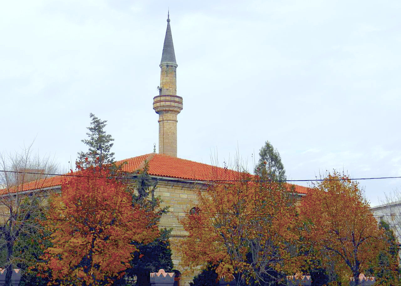 Geamie